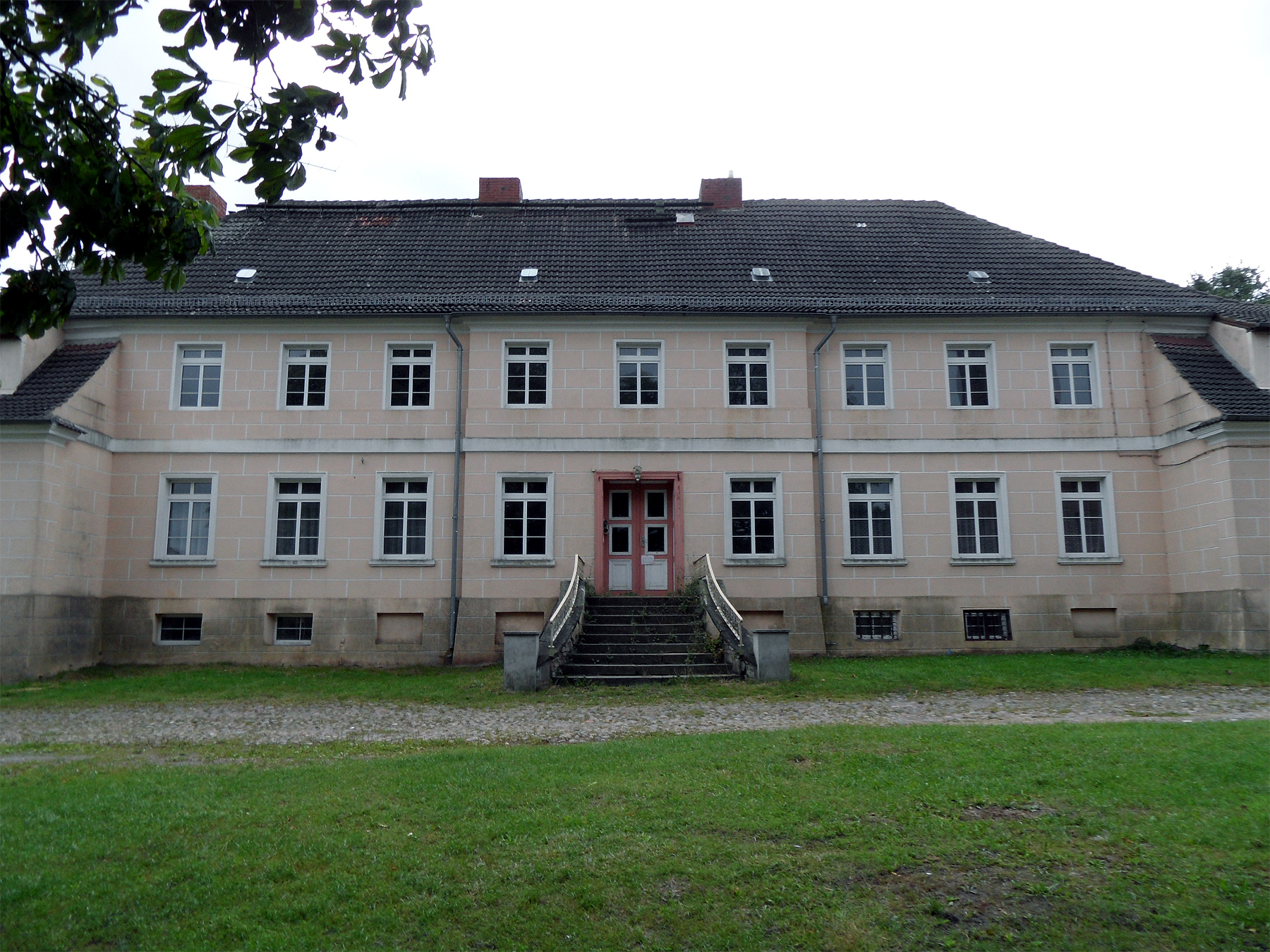 Gut Mürow, Gutshaus (2. Hälfte des 17. Jh.), Hofseite